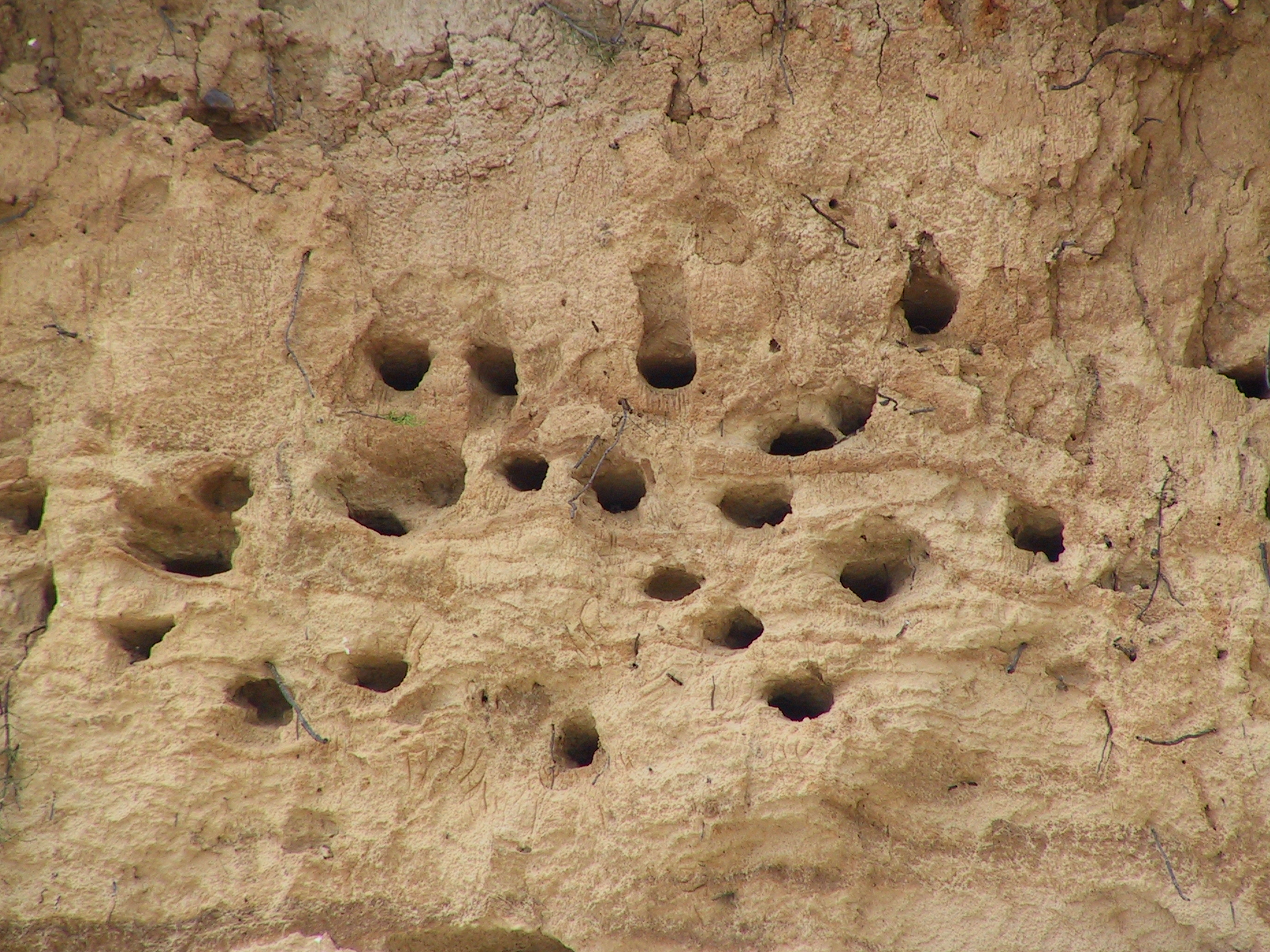 Brutröhre Riparia riparia